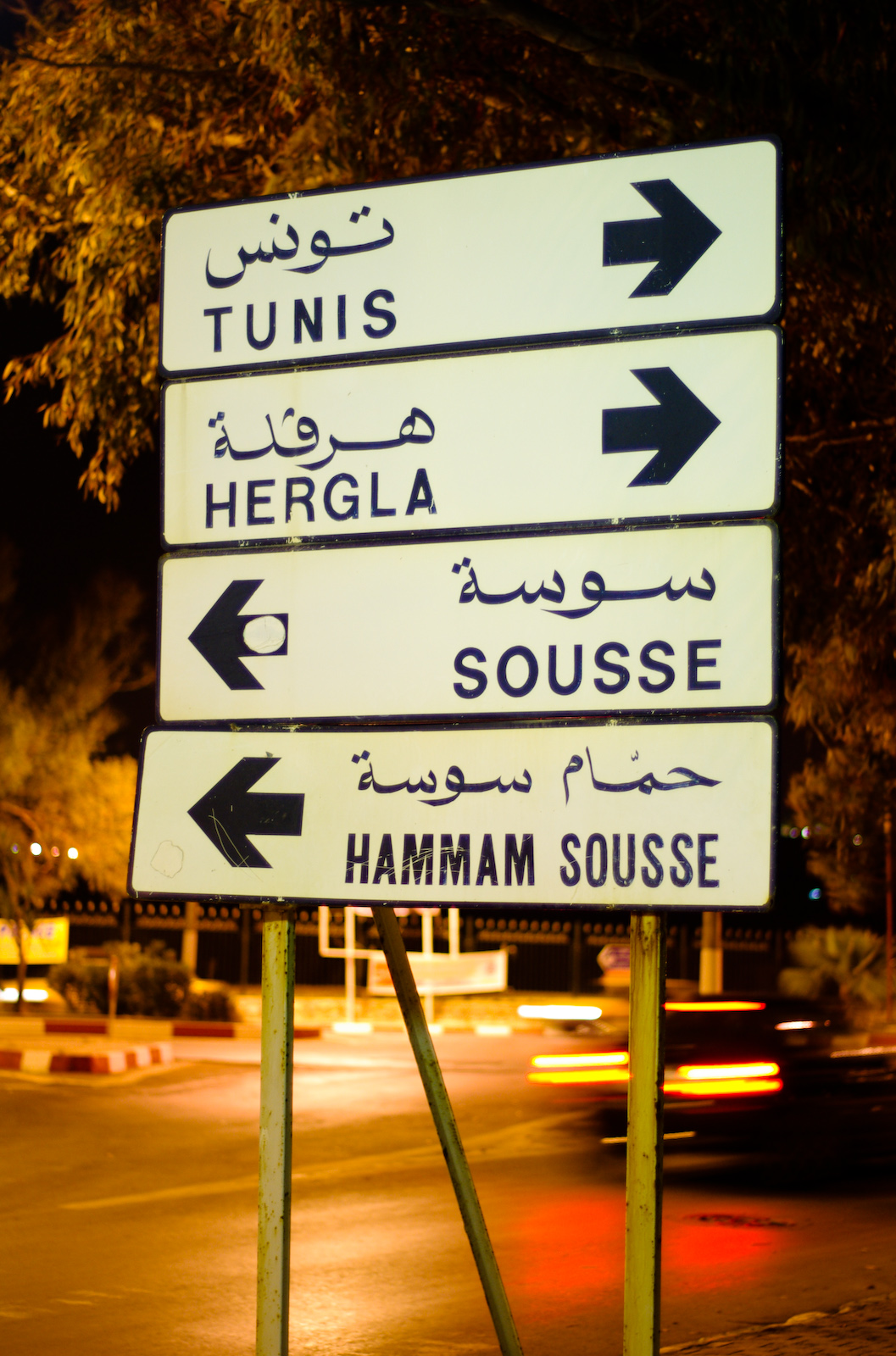 Panneaux de signalisation routière près de Sousse (Tunisie)